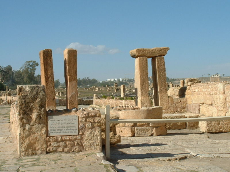 Photographie personnelle prise à Sbeïtla (Tunisie). Il s'agit des pressoirs à huile du site, installés sur une voie antique (quartier byzantin)